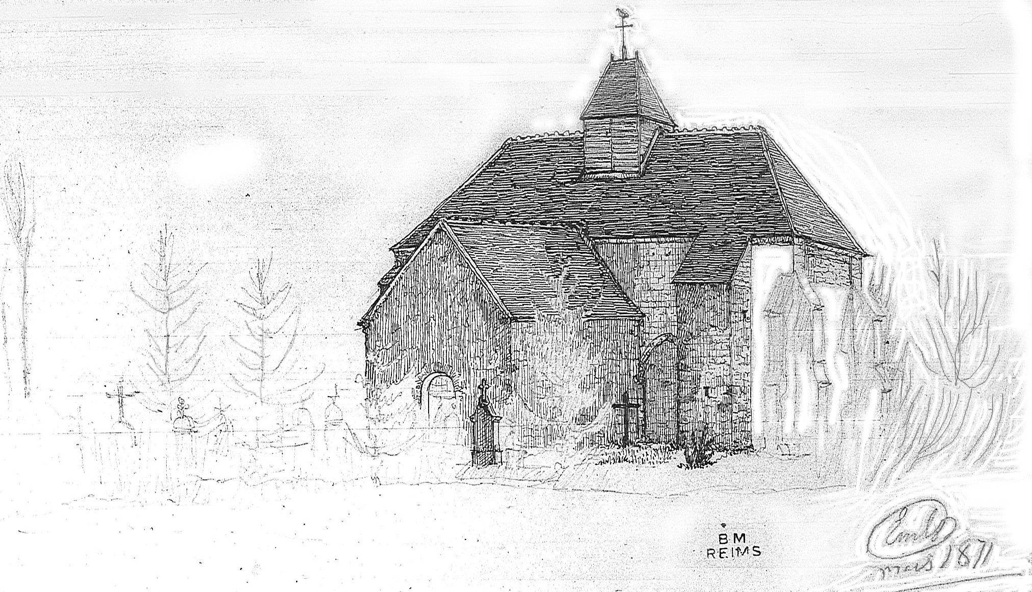 Vue de La Chapelle-Lasso par Gasteboisn.